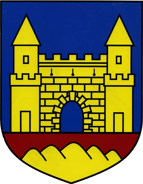 Wappen der Marktgemeinde Hohenau an der March, Österreich, PLZ 2273